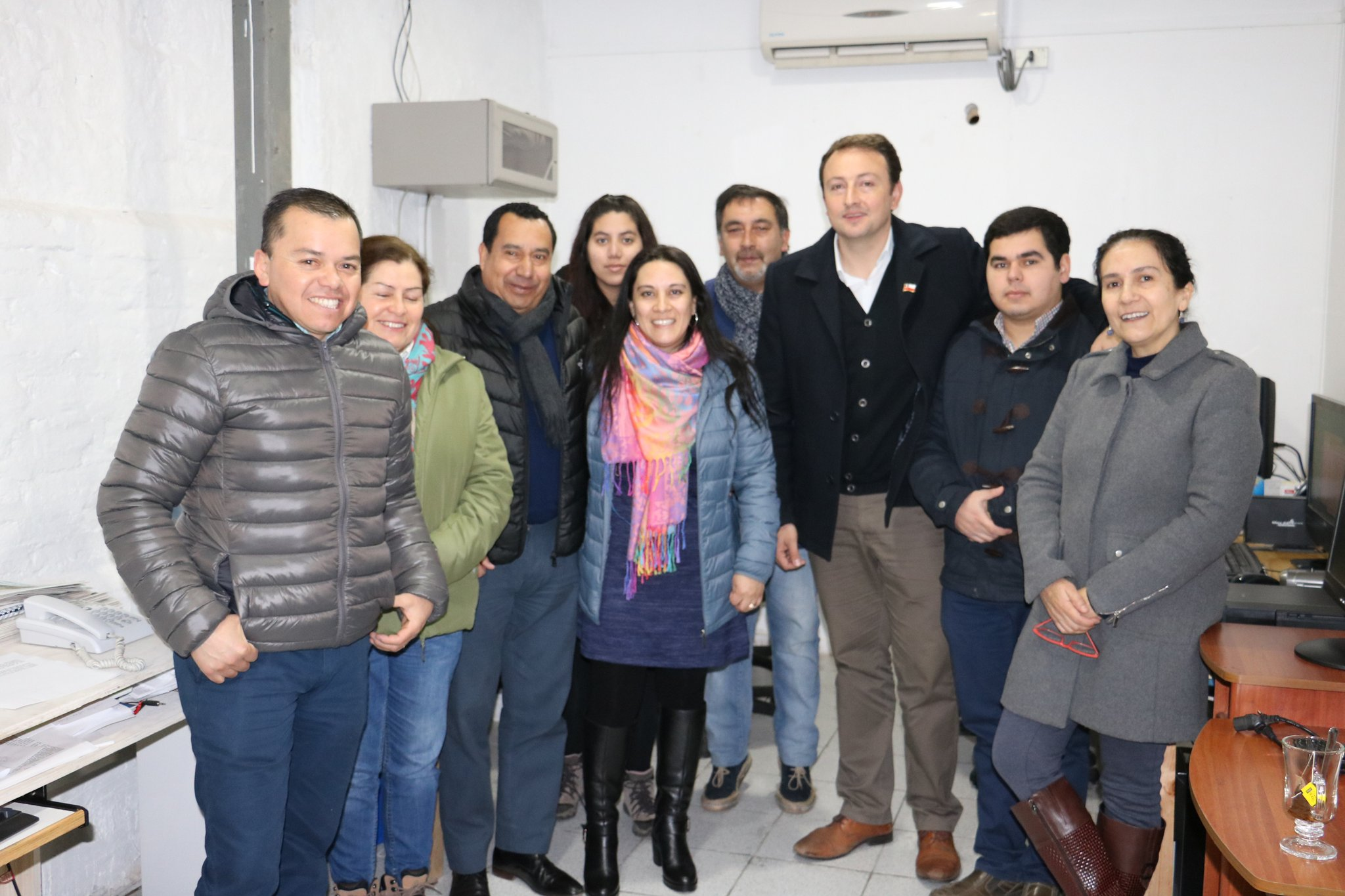 Gobernador Ethit visita Diario VI Región